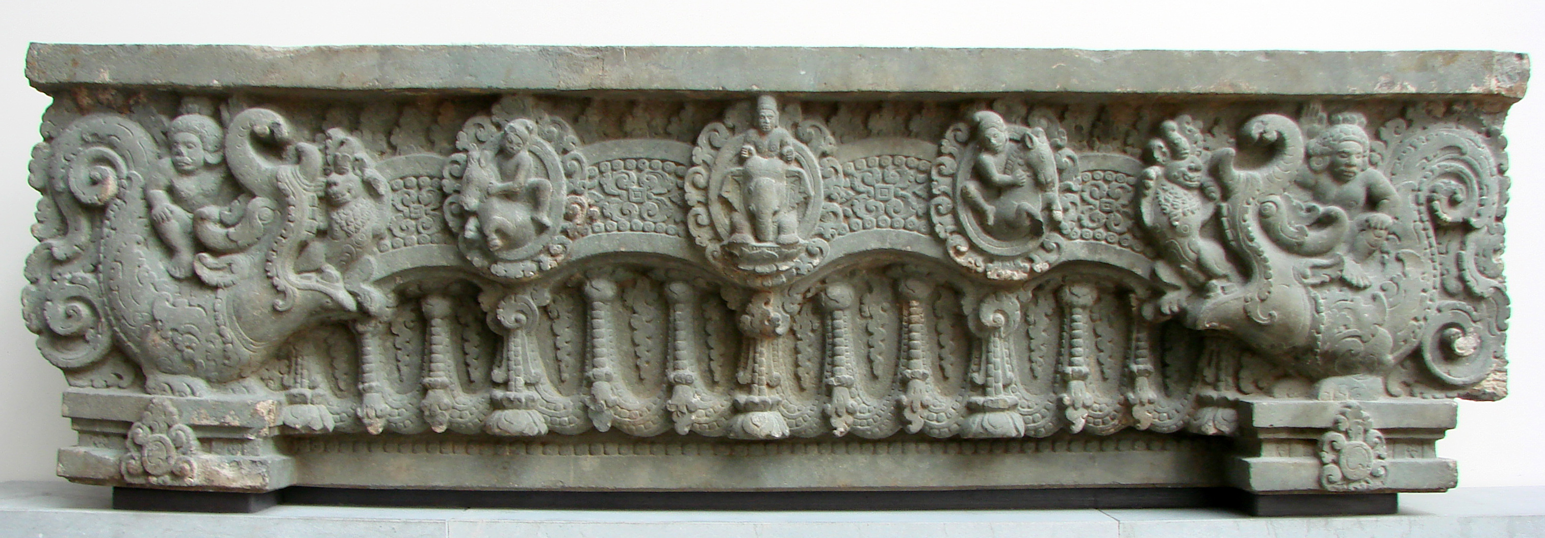 Linteau. Provenance: Cambodge, province de Kompong Thom, Sambor Prei Kuk S7. Style de Sambor Prei Kuk. 1ère moitié du 7ème siècle. Au centre: Indra, dieu de l'orage et gardien de l'Est, chevauchant l'éléphant Airavana; de part et d'autre, les Marut, dieux de la tempête et du vent.Musée Guimet,Paris.